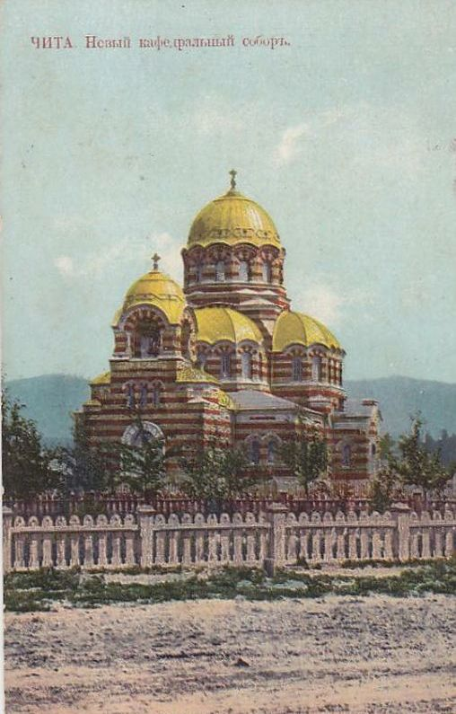 Кафедральный Собор Александра Невского, г. Чита